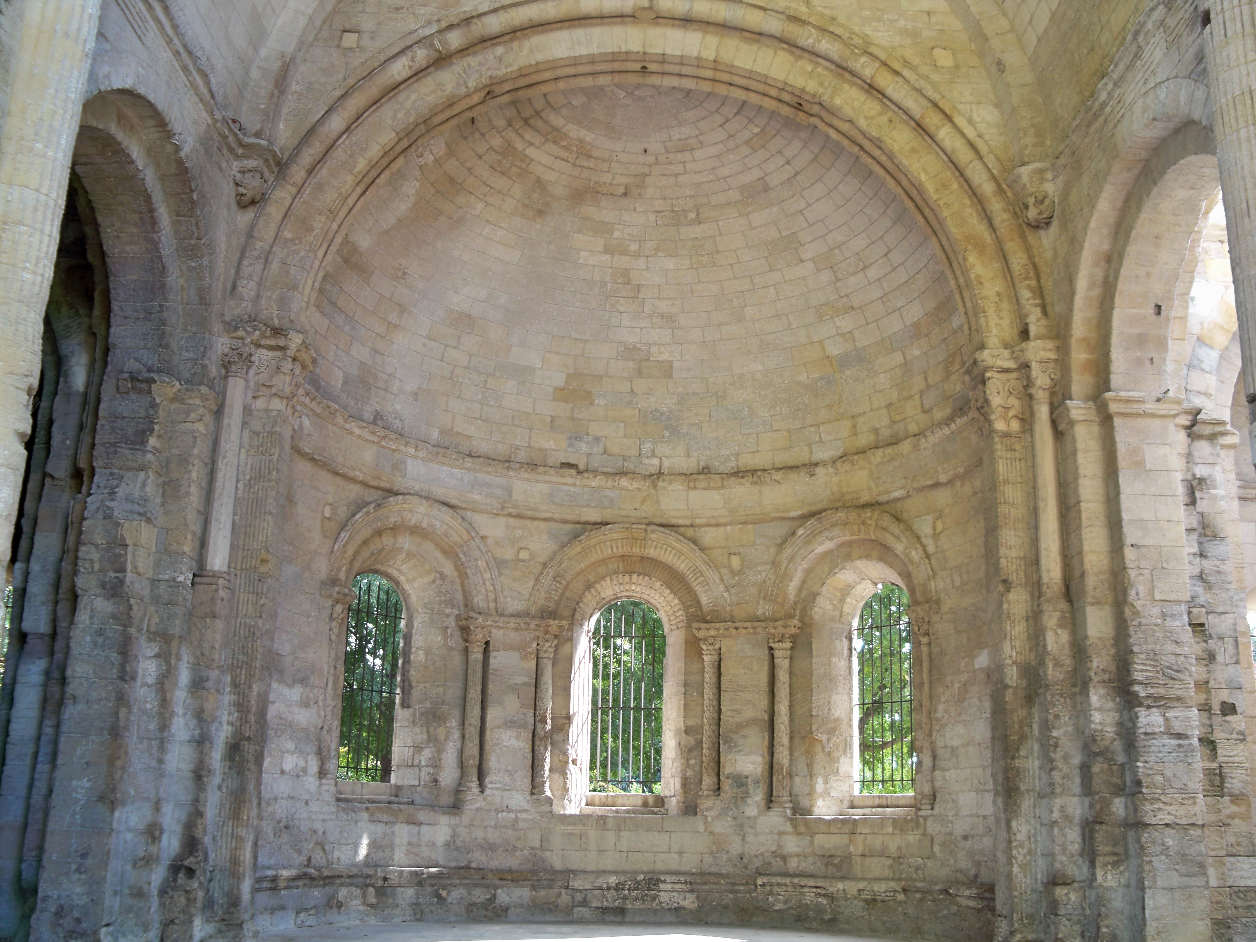 Abbaye de Saint Ruf à Avignon : intérieur abside .